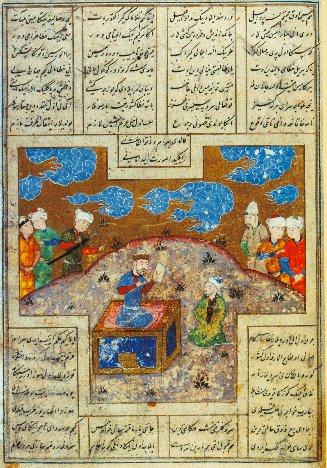 Мани_преподносит_рисунок_Бахрам_Гуру_Mani_presenting_drawing